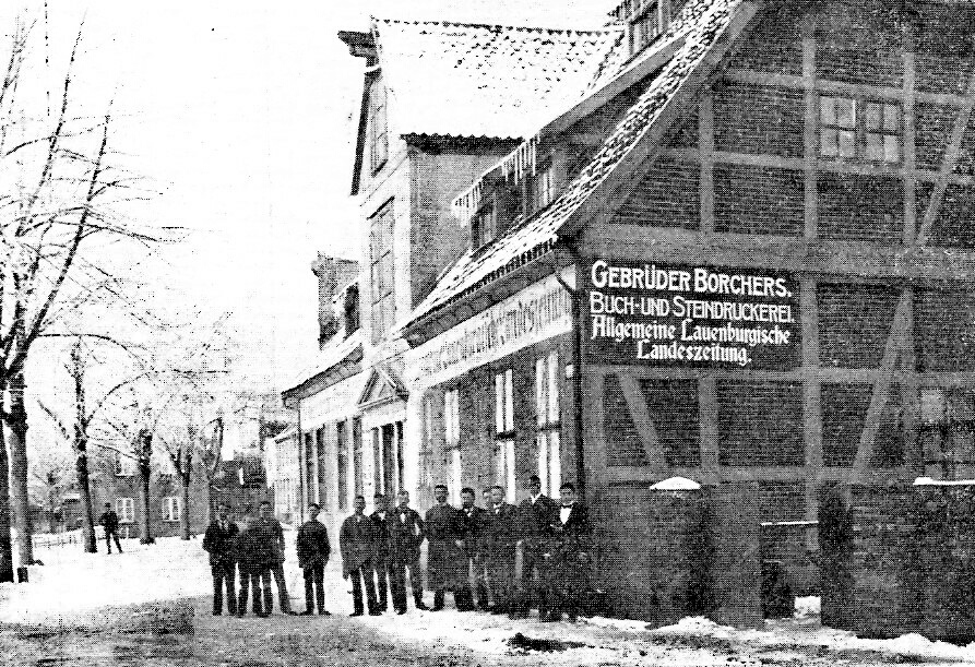 Geschäftshaus der Lauenburger Filiale, Elbstrasse No. 155, Lauenburg a. d. Elbe